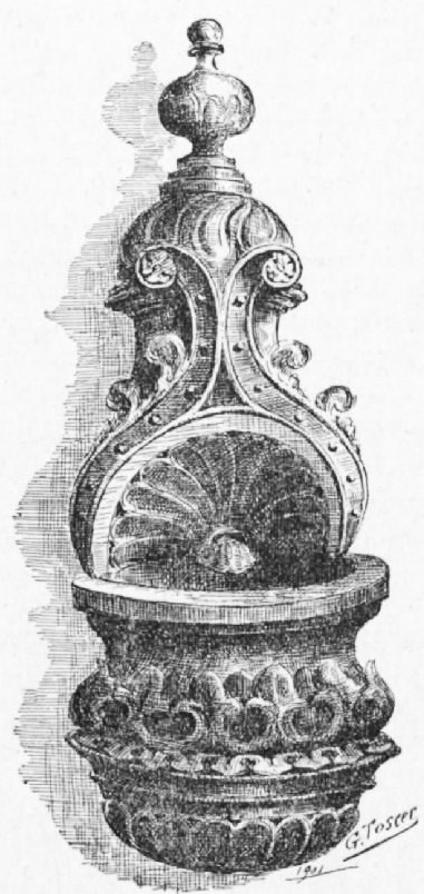 Eglise de Saint-Divy : bénitier style Renaissance (dessin de G. Tosser, 1910)